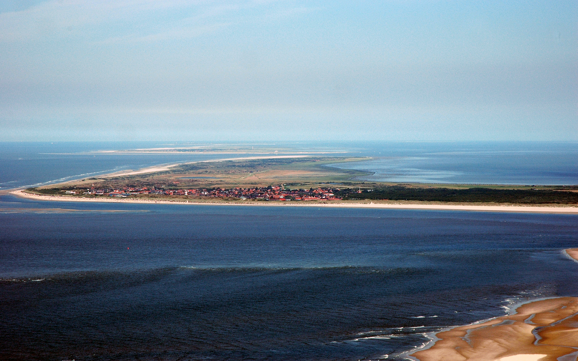 Luftaufnahme Langeoog